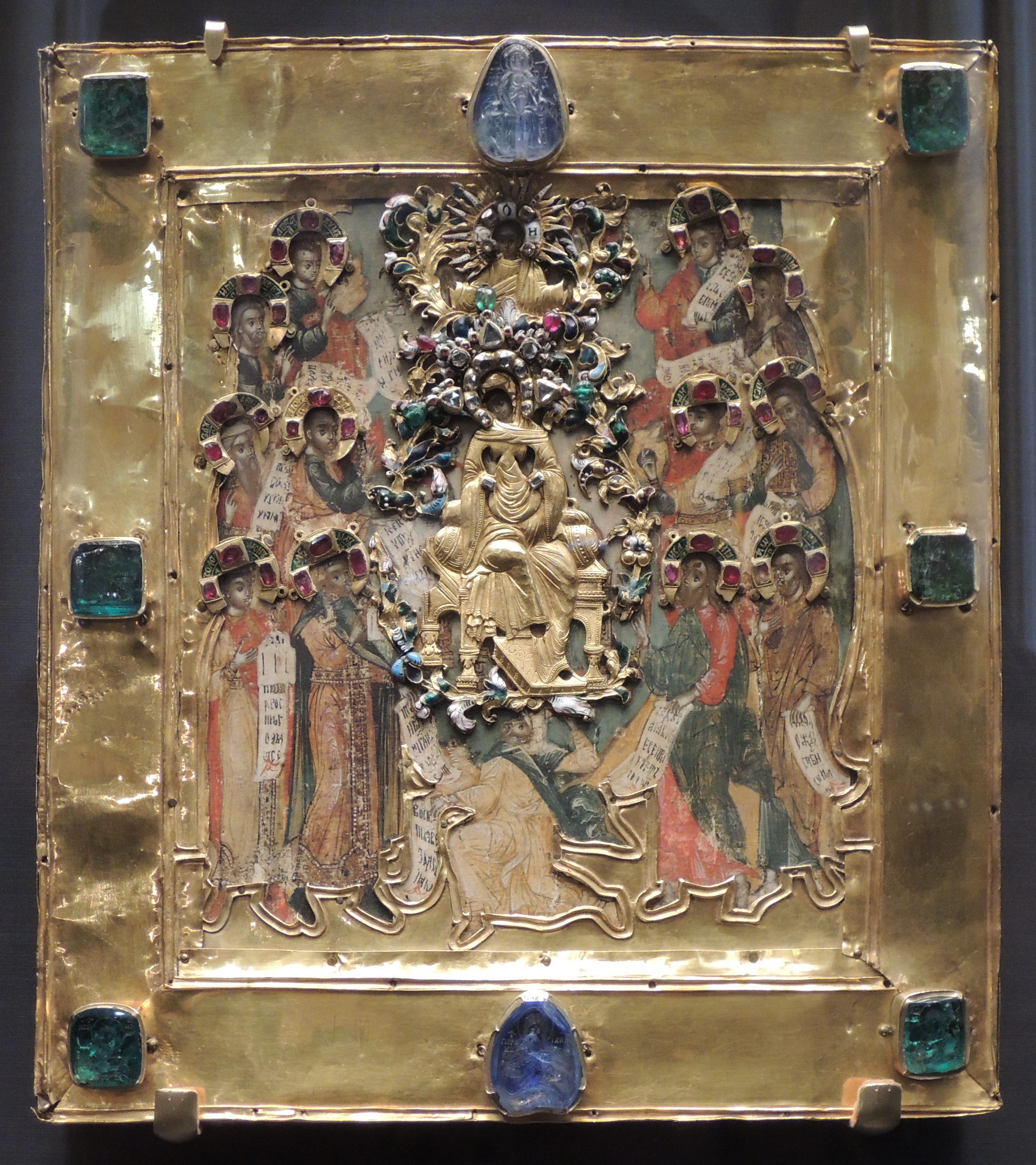 Икона в окладе "Похвала Богоматери". Мастерские Московского Кремля, последняя четверть 17 века. На верхнем поле - сапфировая камея "Богоматерь с младенцем на троне" (Константинополь, 12 век). На полях - священные изображения на сапфирах и изумрудах: вверху Богоматерь на троне, внизу - пророк Илия, по углам евангелисты, на боковых сторонах - Иоанн Предтеча и преподобная Параскева - тезоименные святые царя Иоанна Алексеевича и царицы Прасковьи. Контурные изображения на камнях выполнены русскими камнерезами 17 века.